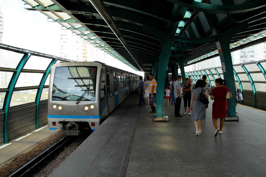 Moscow Metro (Московский метрополитен) Butovskaya Line of Light Metro (Бутовская линия лёгкого метро)